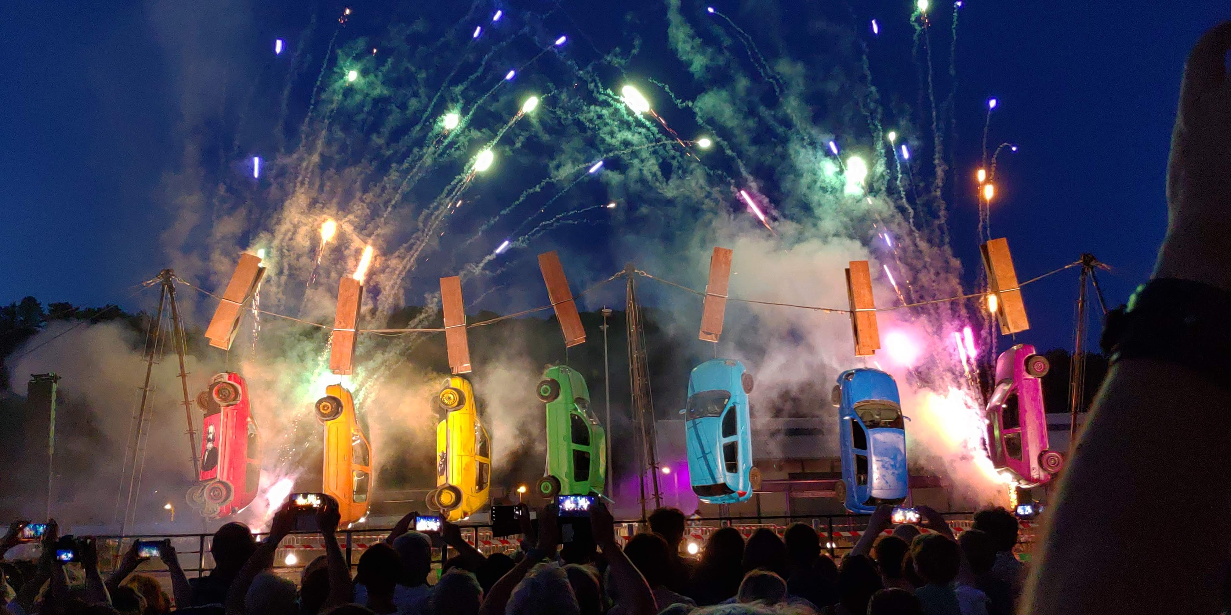 Générik Vapeur - Drôles d'oiseaux et Arts Blaxons !